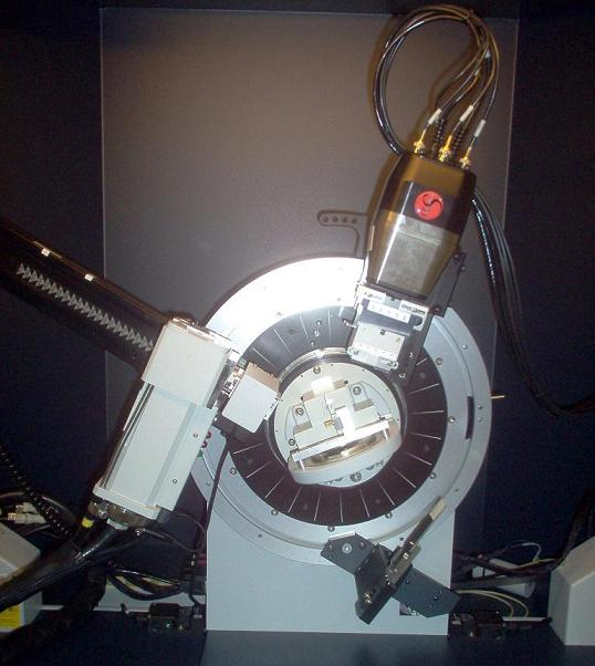 Foto van een diffractometer, genomen met simpel digitaal fototoestelletje. Deze diffractometer is eigendom van de afdeling Technische Materiaalwetenschappen aan de Technische Universiteit Delft.